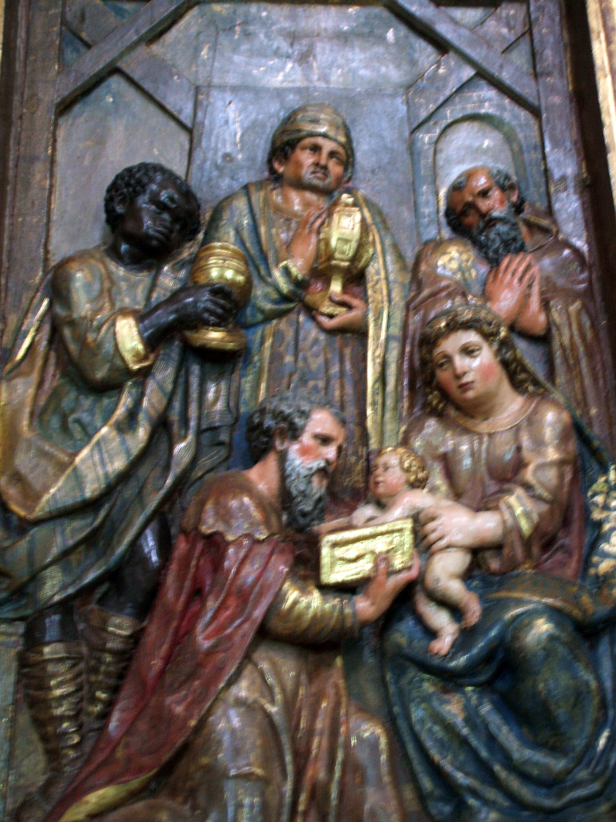 Detalle del retablo de Bolduque en la iglesia conventual de la Concepción de Cuéllar.